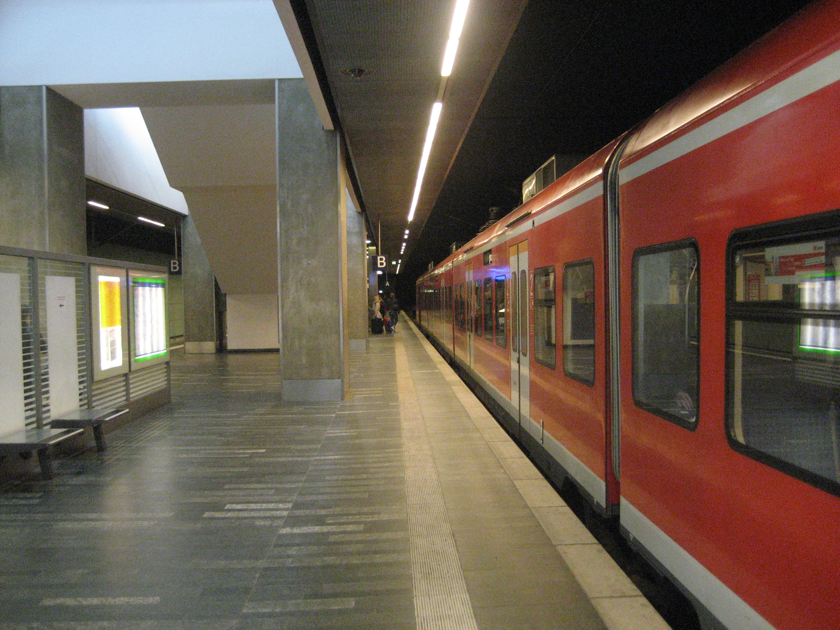 Bahnhof Hannover Flughafen: Bahnsteig, Blick nach Südwest, d.h. Richtung Streckenende.